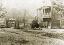 Saint-Alphonse-de-Granby